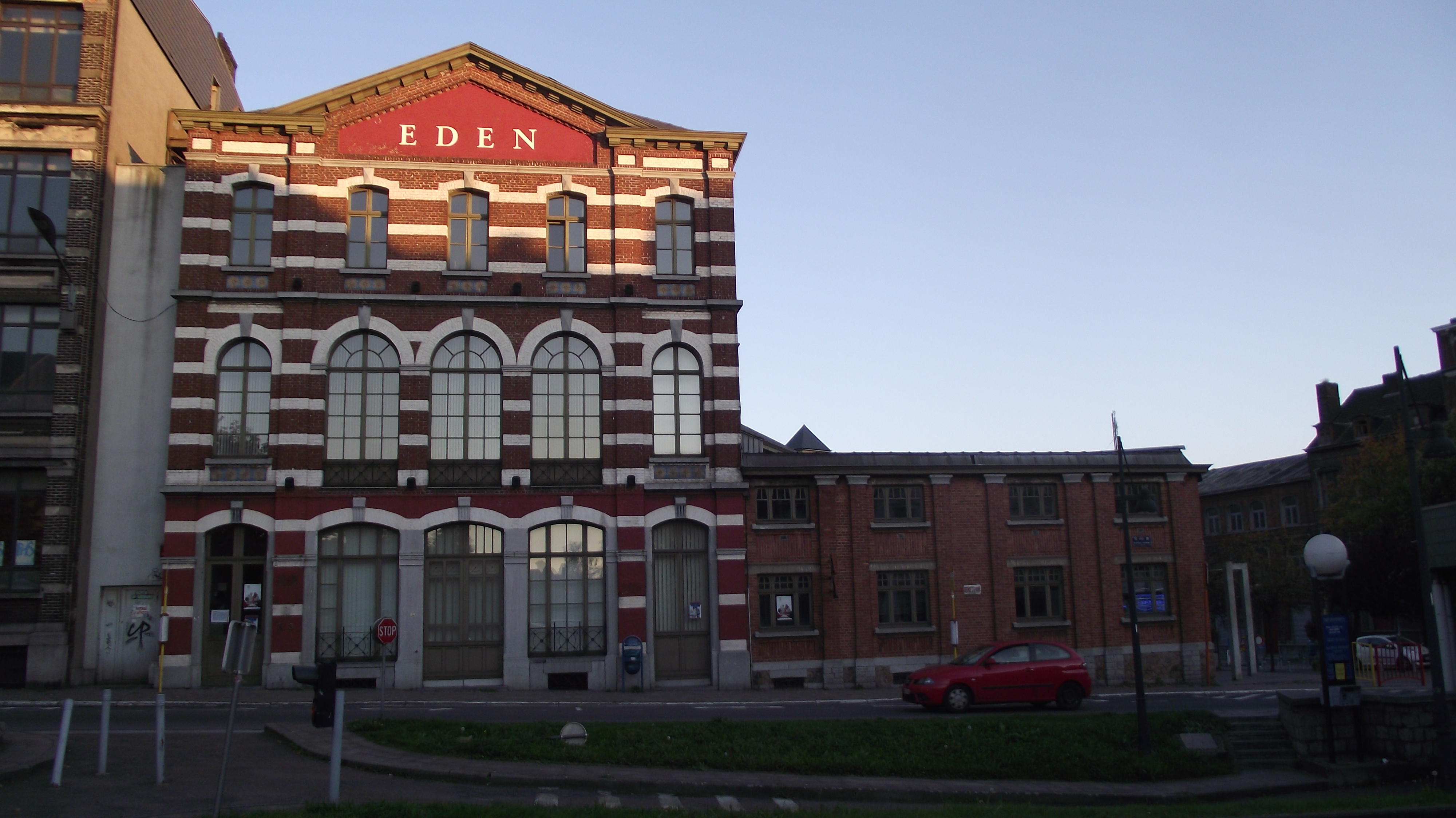 Eden feestzaal en cultureel centrum. Het vroegere trameindpunt werd er naar genoemd. Straat: Boulevard Jacques Bertrand